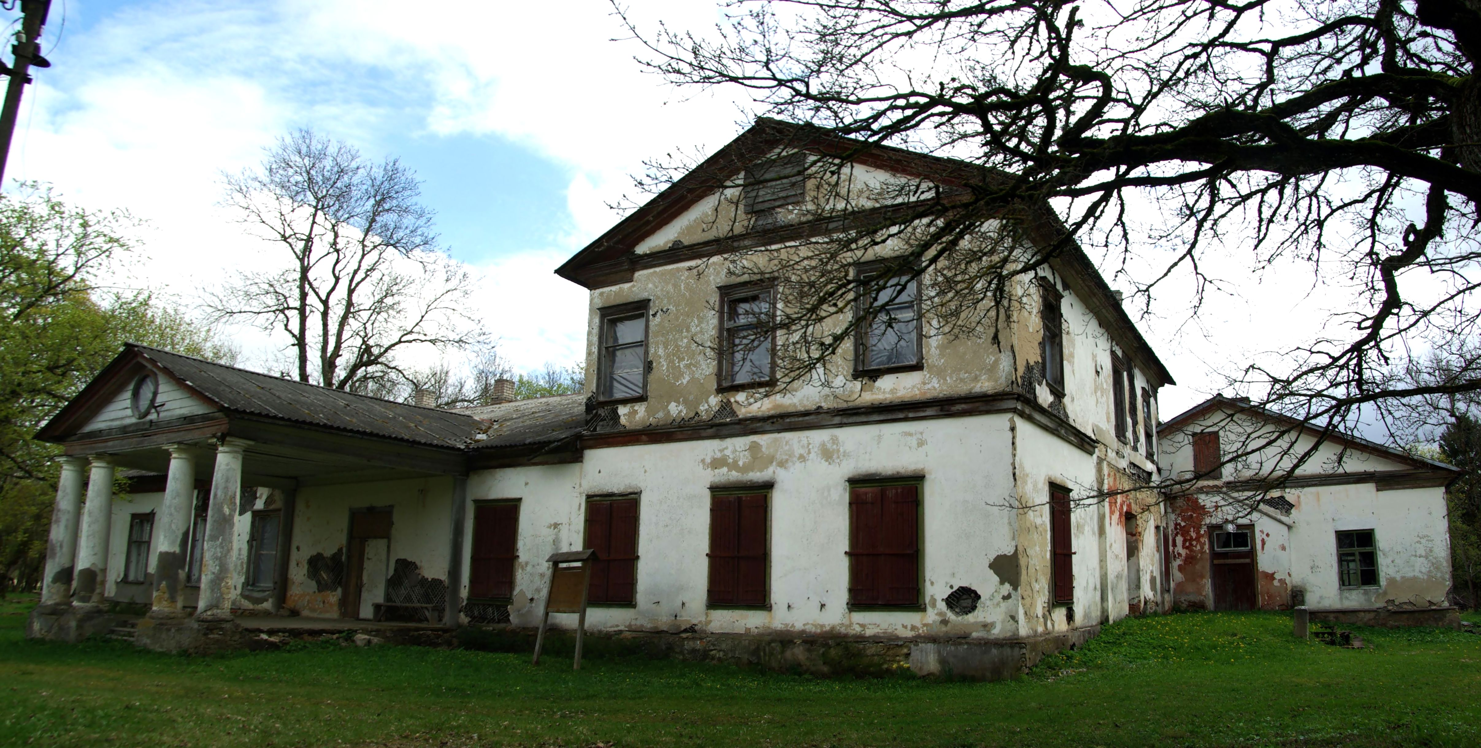 Võhmuta mõisa peahoone